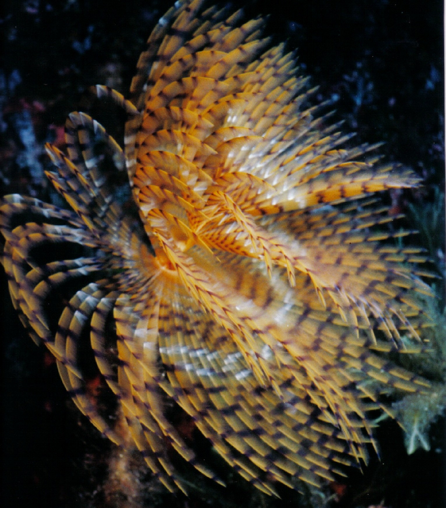 Schraubensabelle